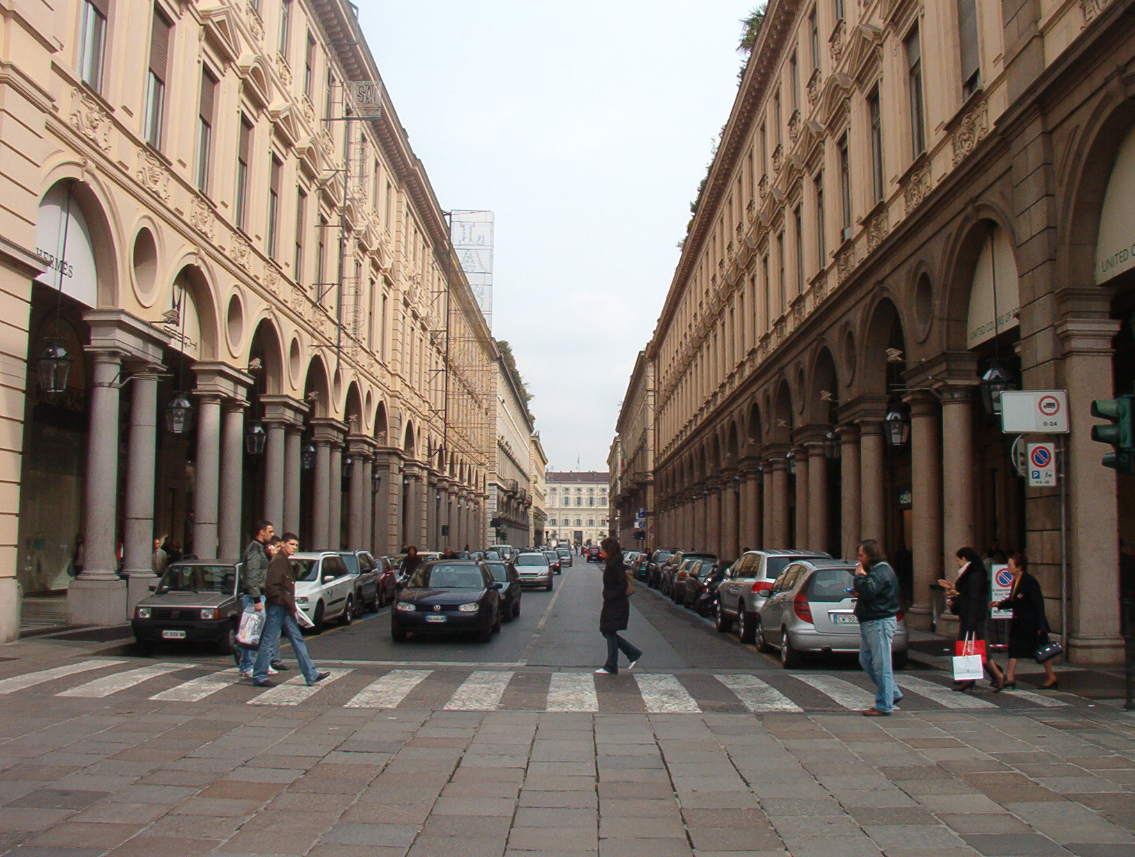 via Roma - Torino - Italia